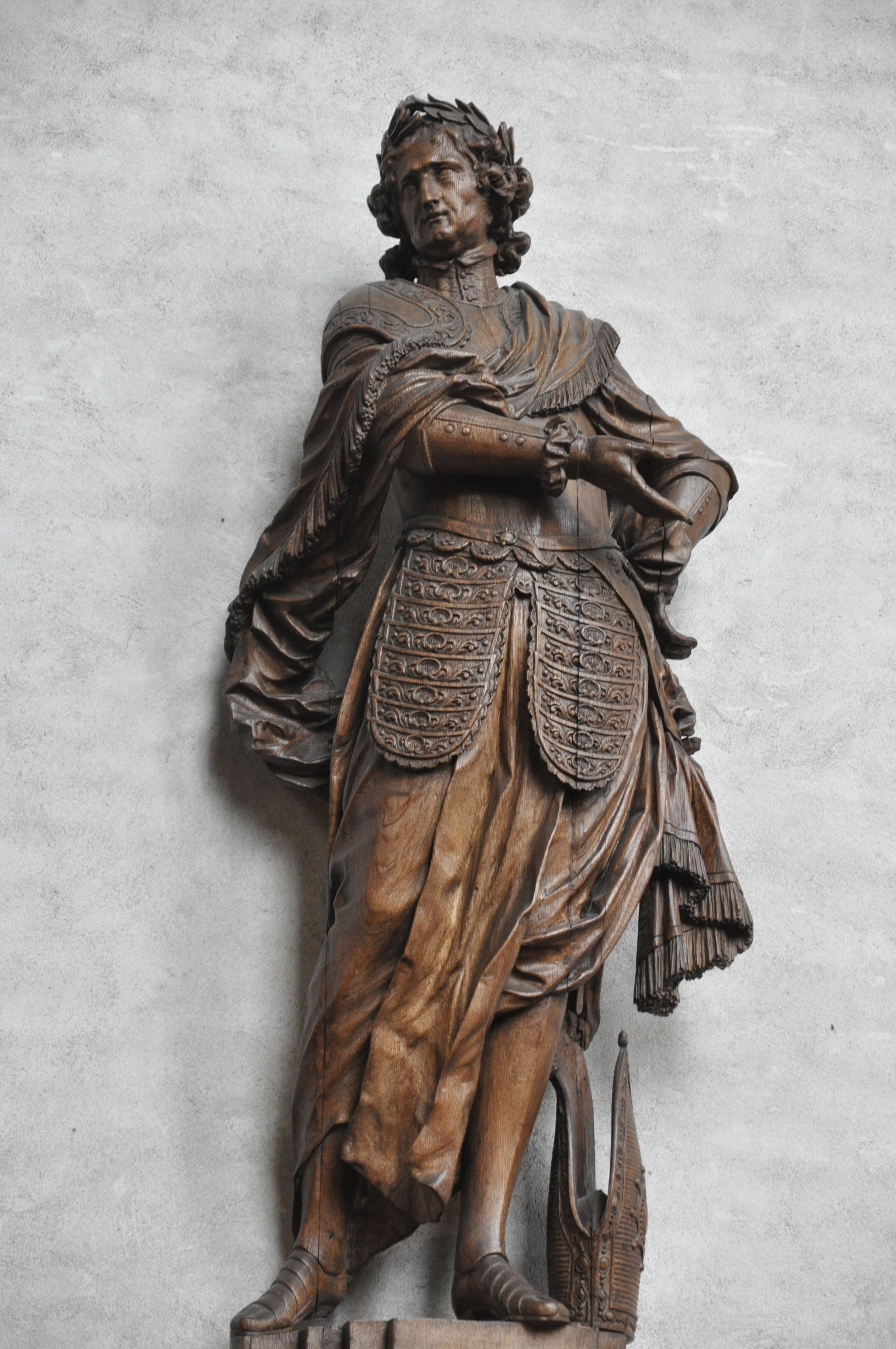 Raymundus van Fitero beeldhouwer: Quellinus de jongere